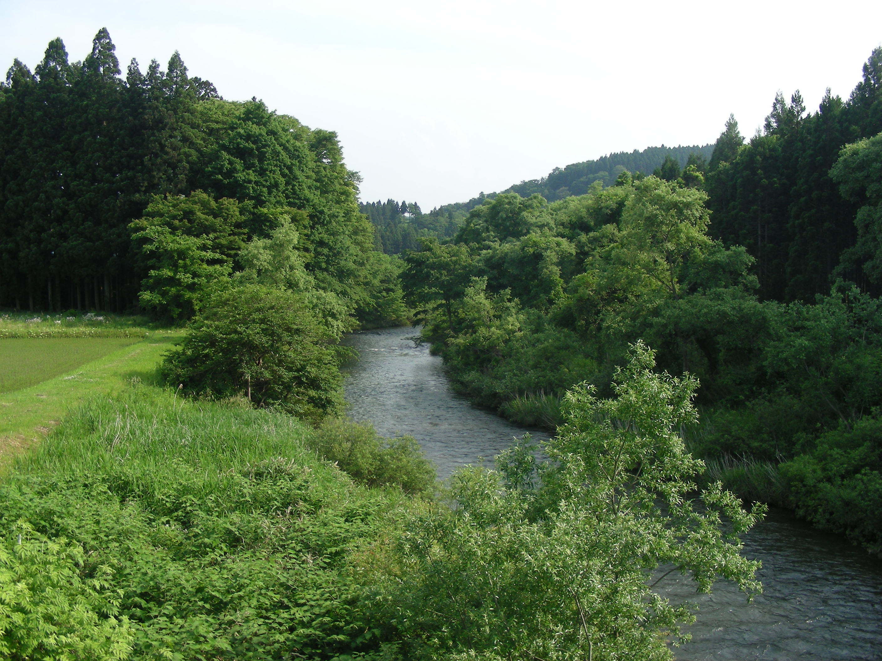 岩手県奥州市衣川区を流れる衣川。2008年6月9日撮影